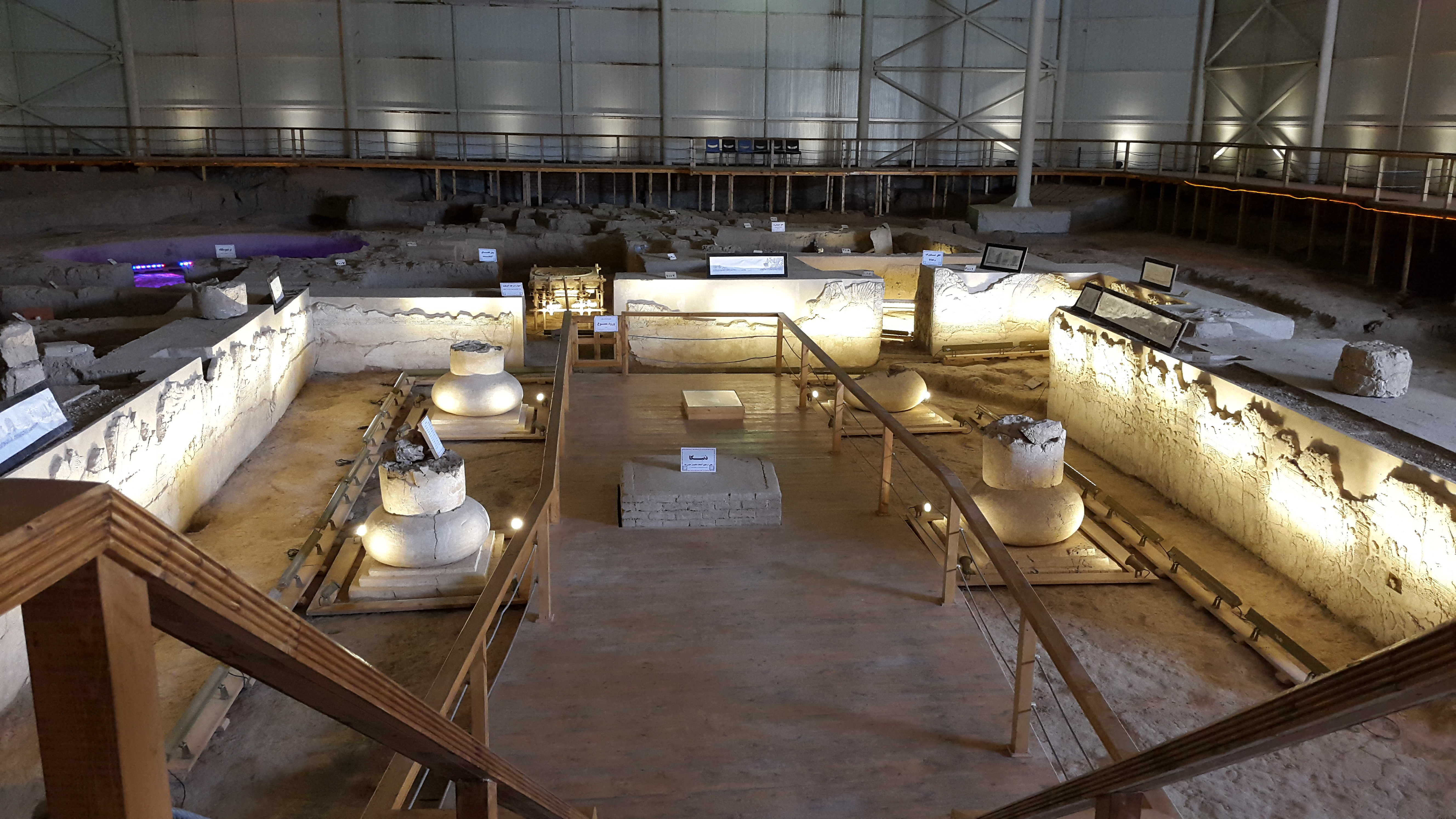 محوطه باستانی بندیان